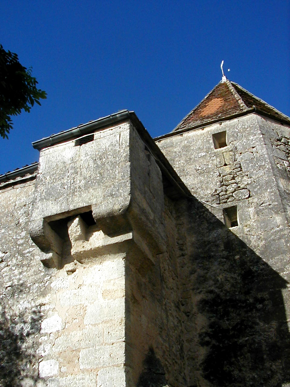 Eglise de Saint Antoine, échauguette